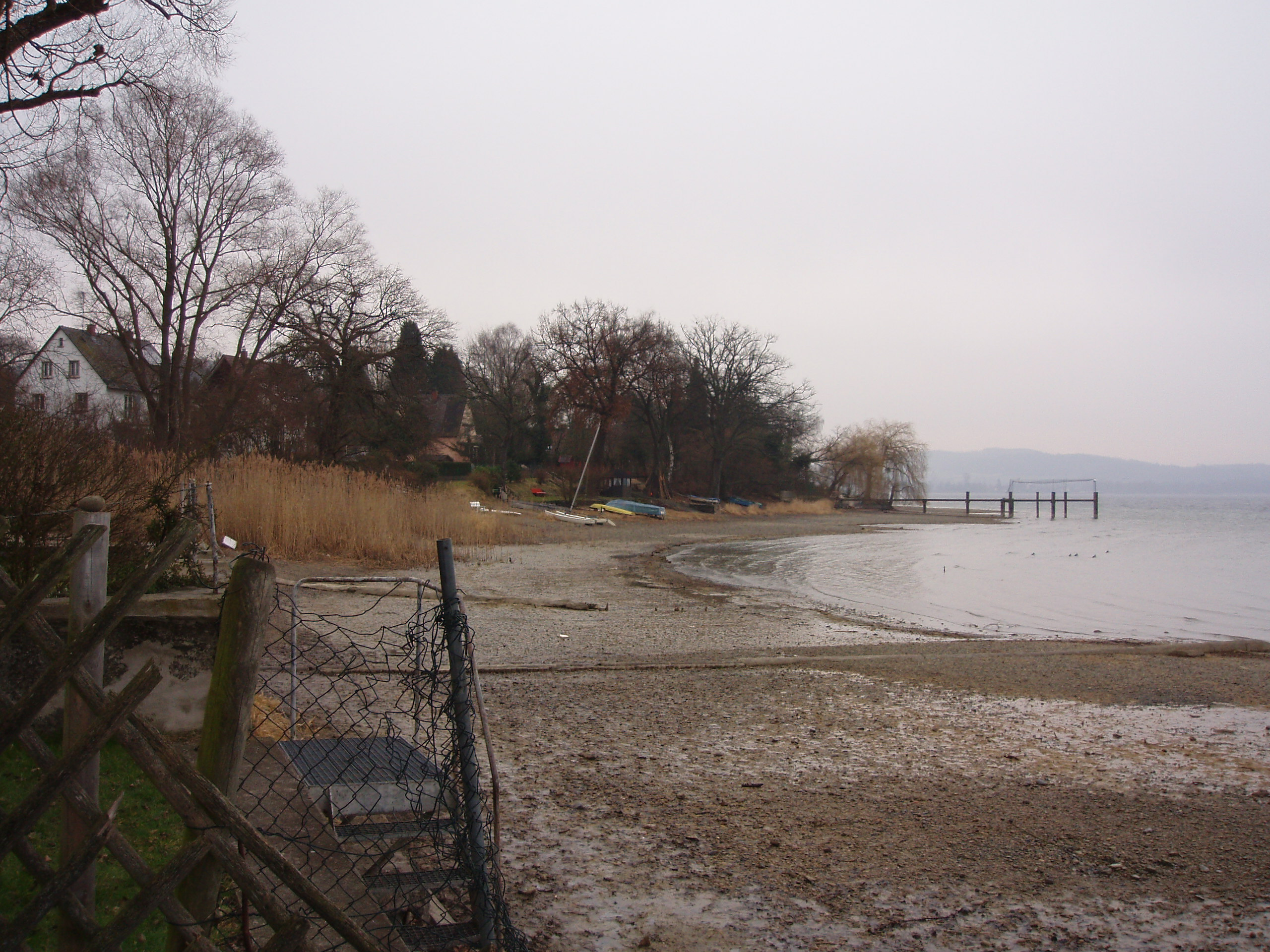 Blick auf den Bodensee in Nussdorf